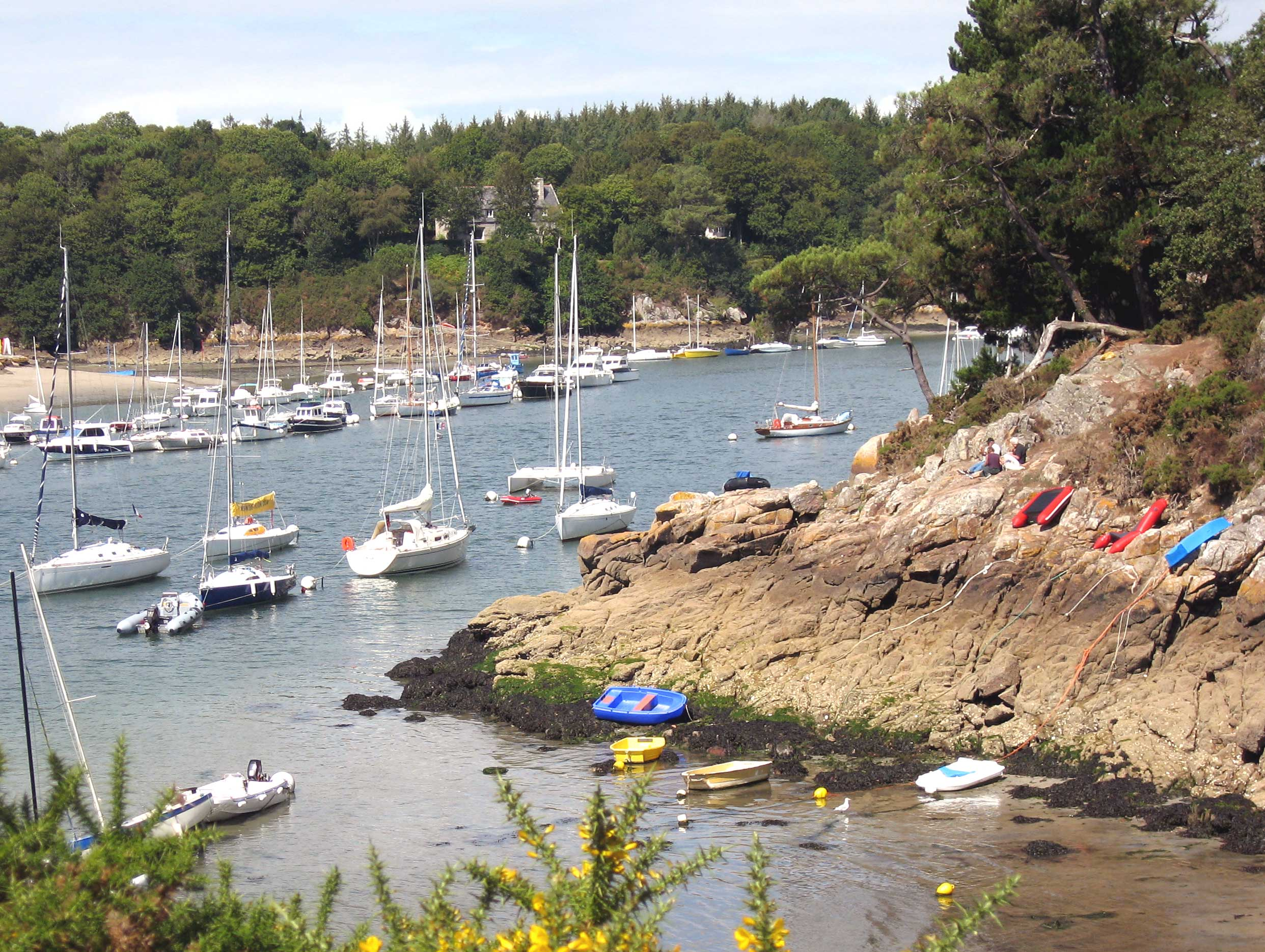 Description : la ria de l'Aven près de l'Anse du Pouldon en Névez ; à l'arrière-plan la rive gauche de l'Aven à Goulet Riec (en Riec-sur-Bélon) Place : Nevez, Bretagne, France Date : 2006 Auteur : Pline